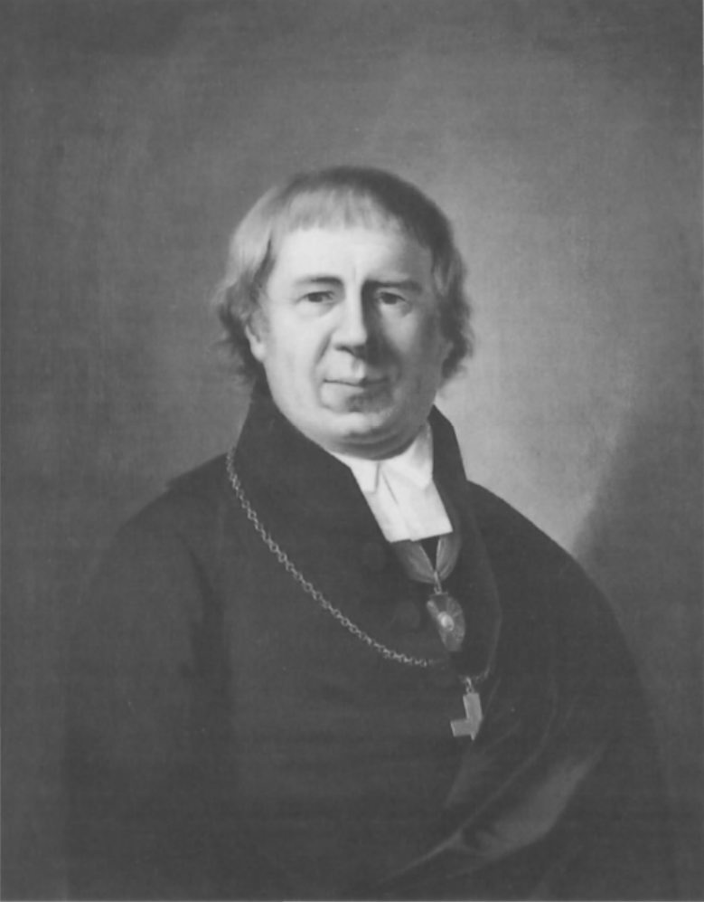 Закариас (Закрис) Сигнеус, епископ Санкт-Петербурга (1820—1830).